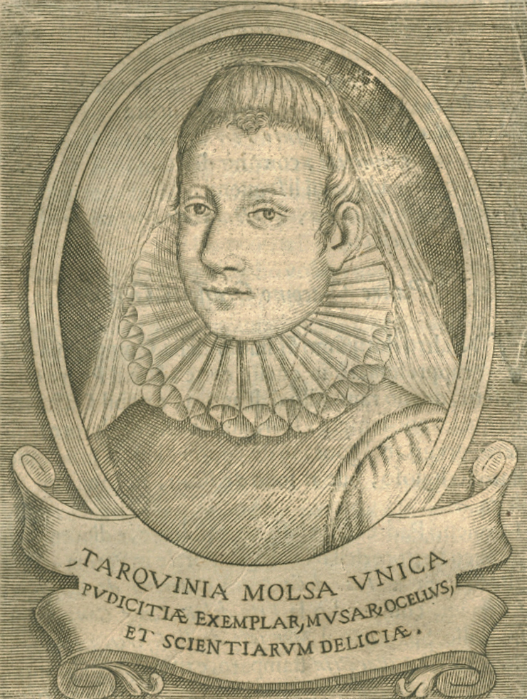 Tarquinia Molza, dottissima Signora detta Unica